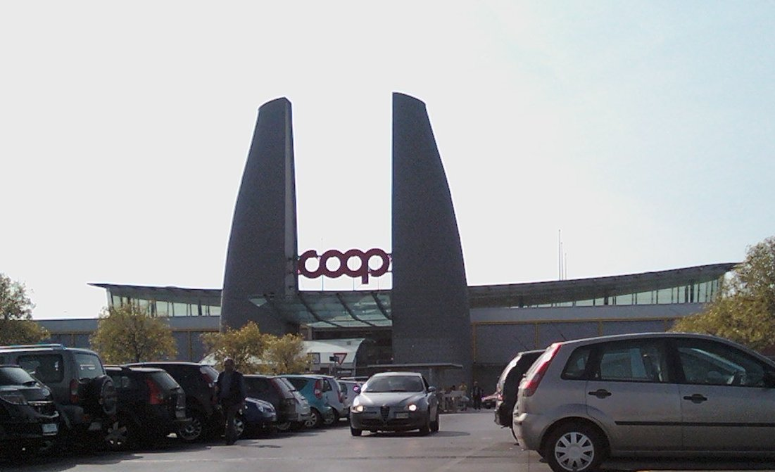 Un punto vendita coop di Firenze Scandicci